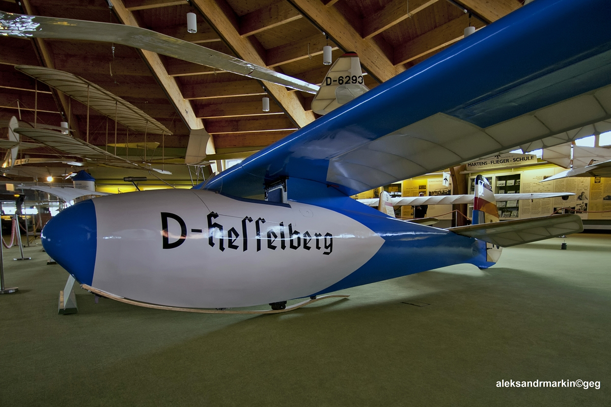 Rhönbussard "Hesselberg" D-1137 1932 Original